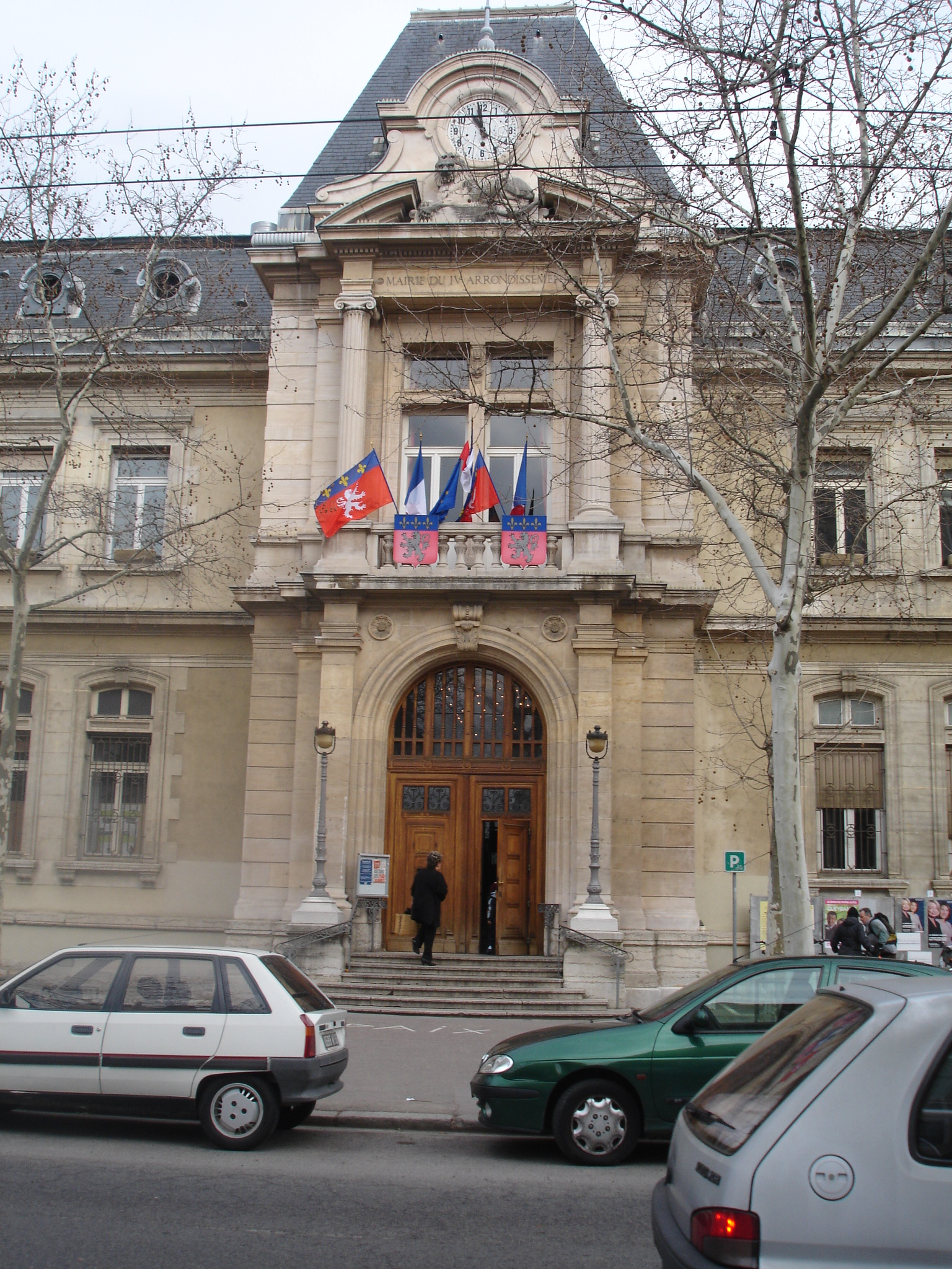 Lyon : l'entrée de la mairie de La Croix Rousse